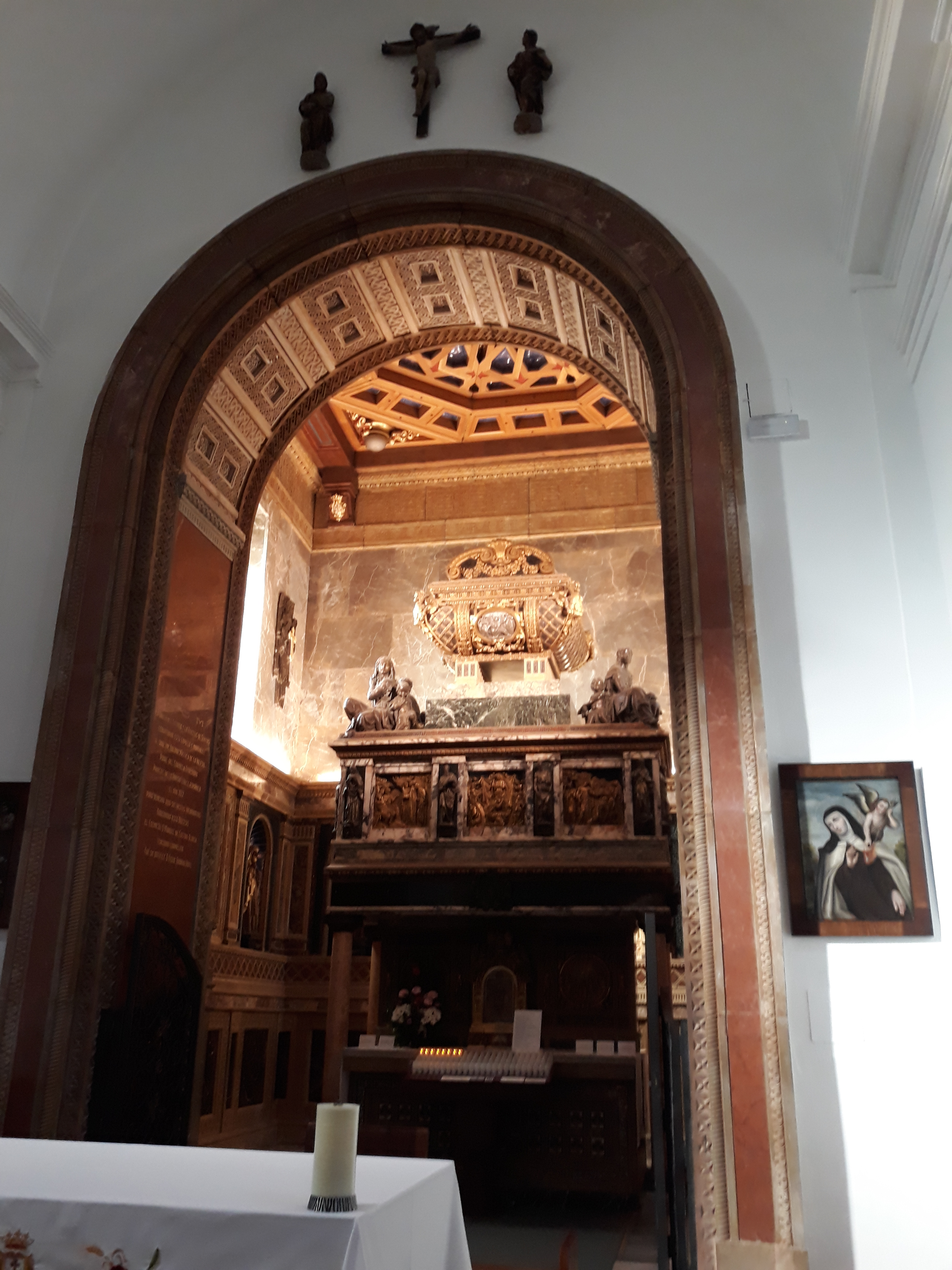 Die Grabkapelle des Mystikers und Heiligen Johannes vom Kreuz in Segovia.